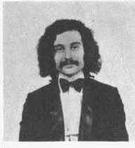 Jorge Maronna, músico y humorista argentino